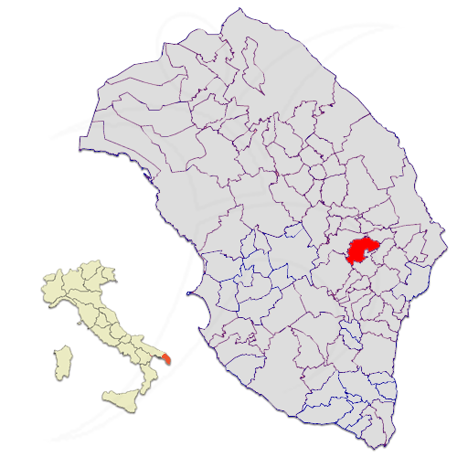 Il territorio del comune di Muro Leccese nella provincia di Lecce